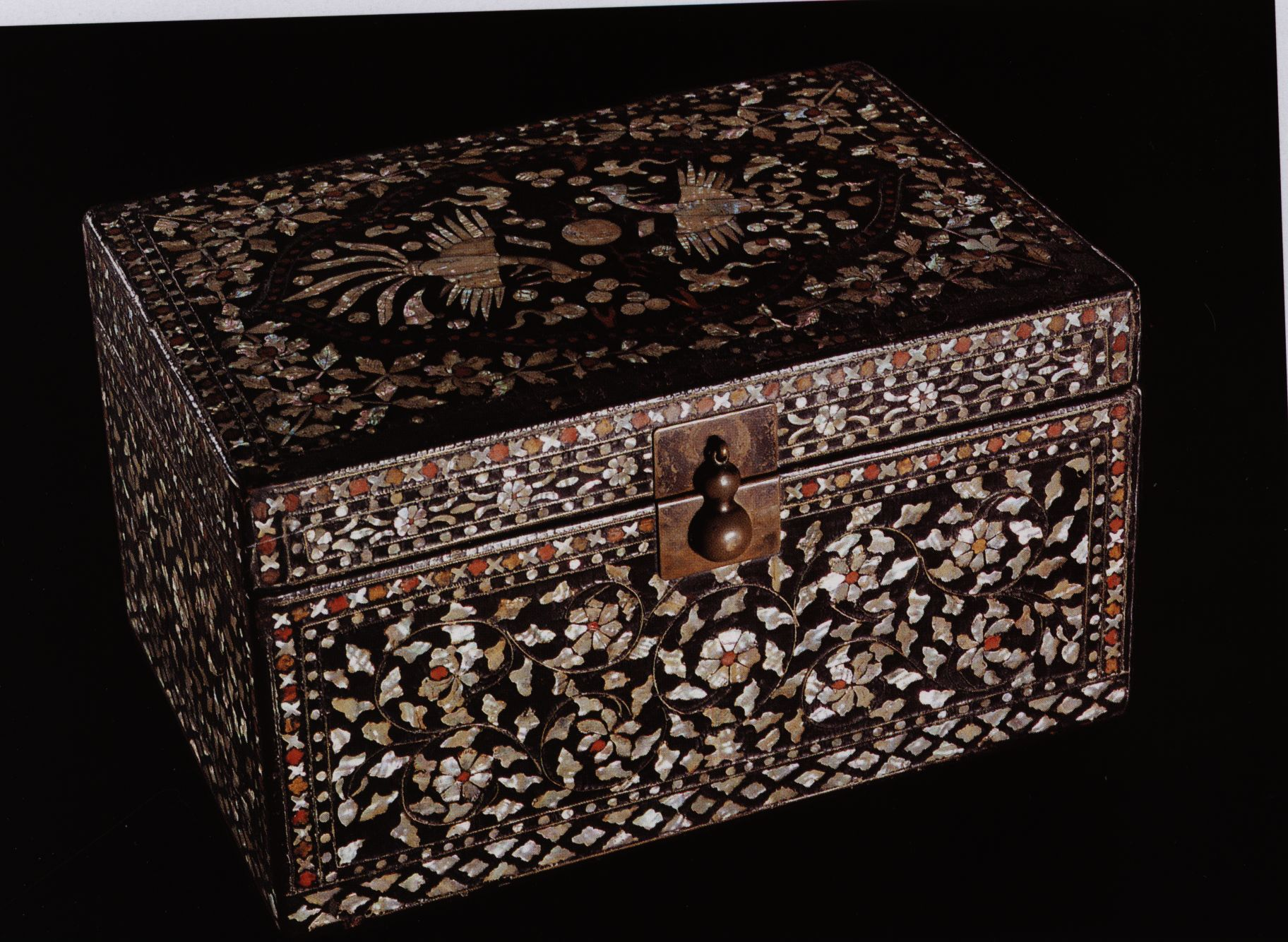 Boite décorative pour mariage, bois, laque noire et incrustations de nacre, décor de rinceaux végétaux, 15 X 18 X28, période Joseon (début 15e siècle)